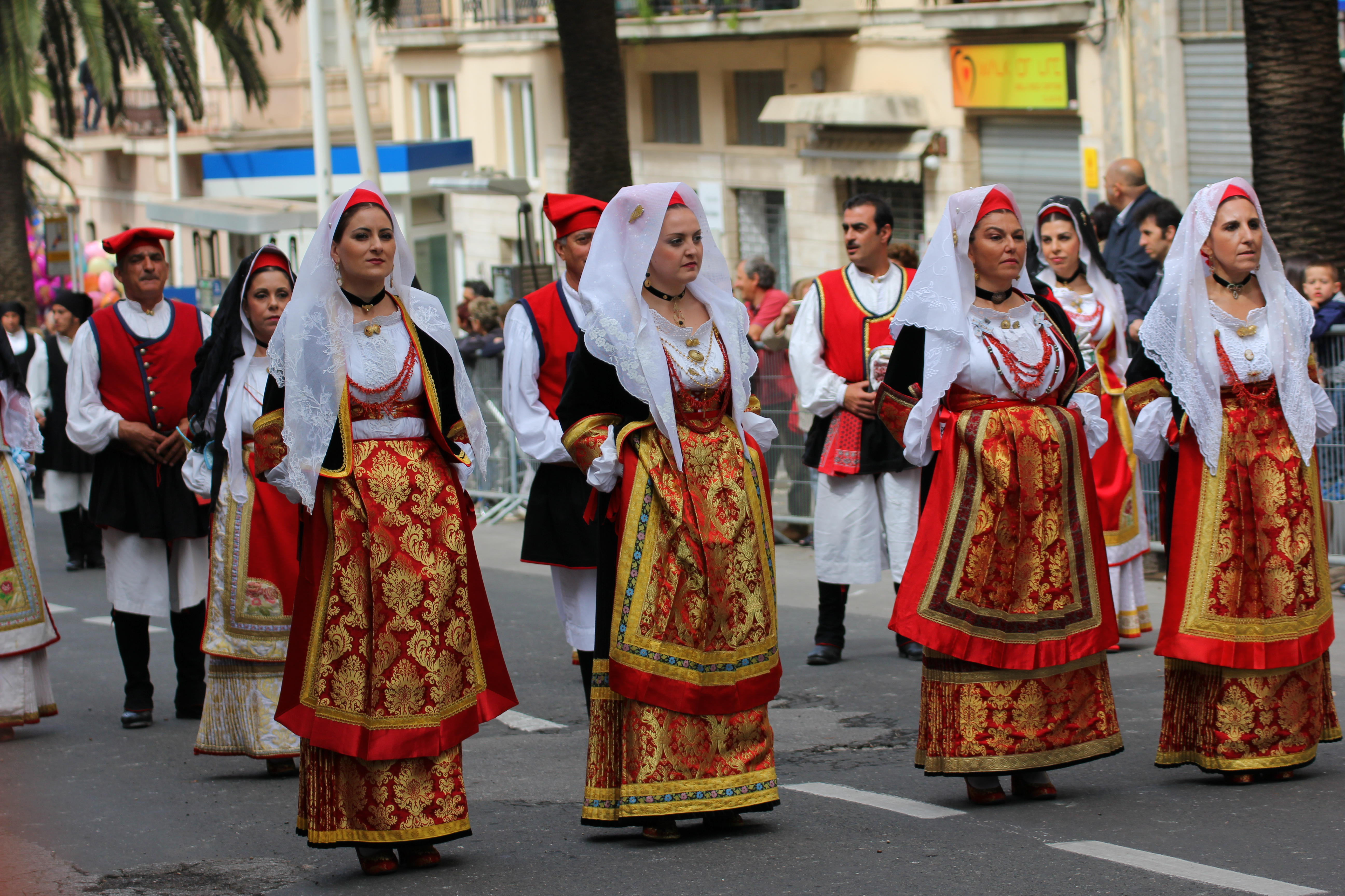 Costume tradizionale